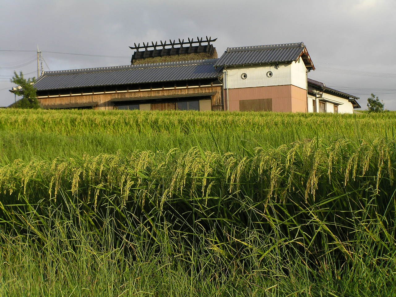 神戸市北区北僧尾の古民家と山田錦